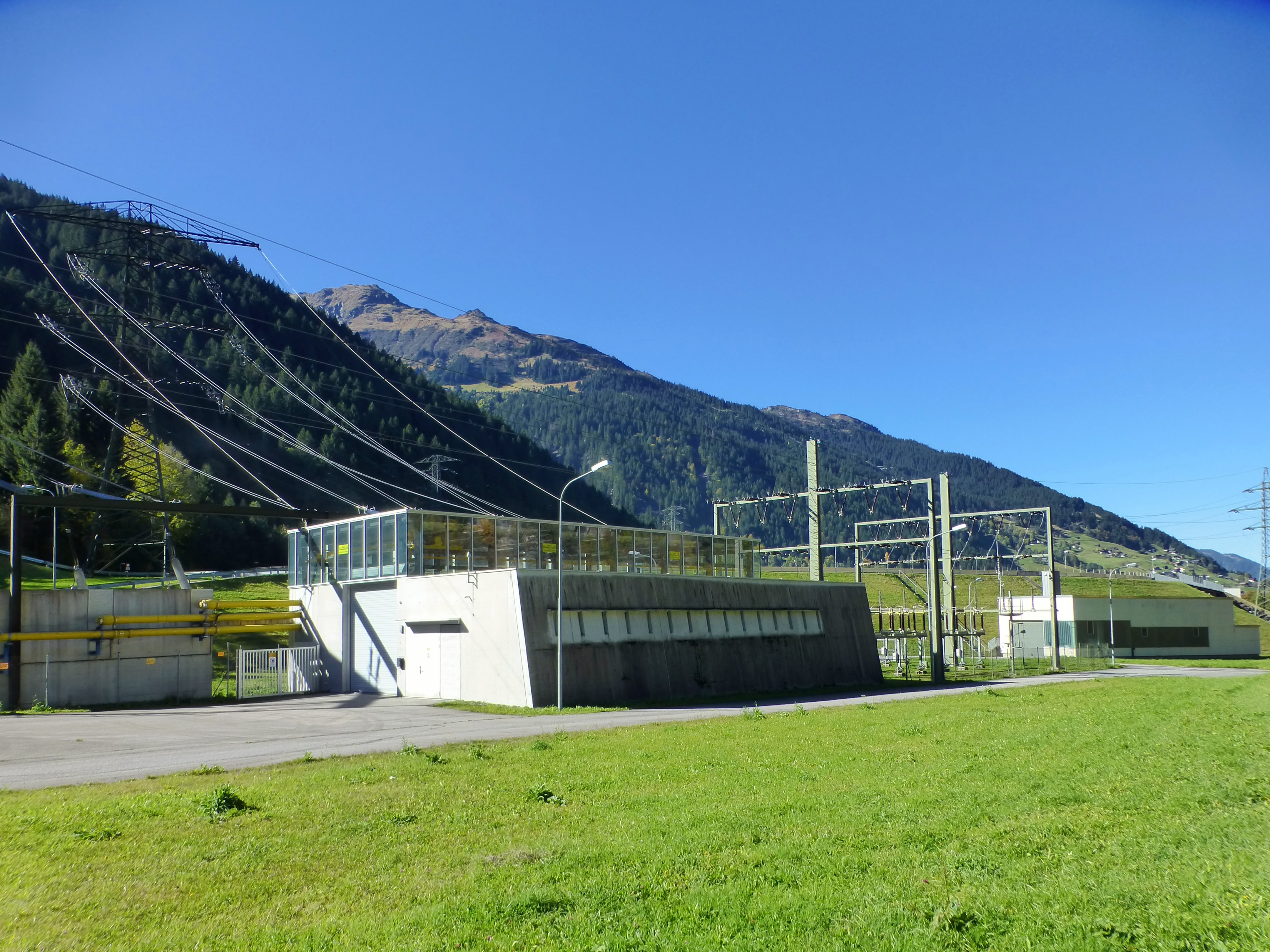 das Rifawerk, ein Speicherkraftwerk der Vorarlberger Illwerke